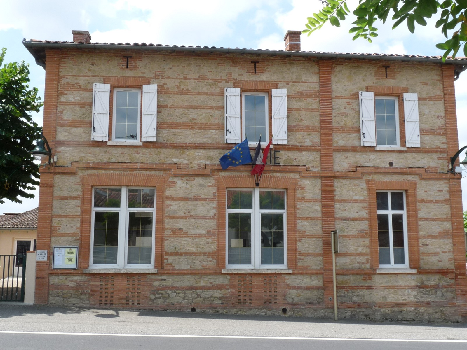 Mairie de Saussens, Haute-Garonne, France